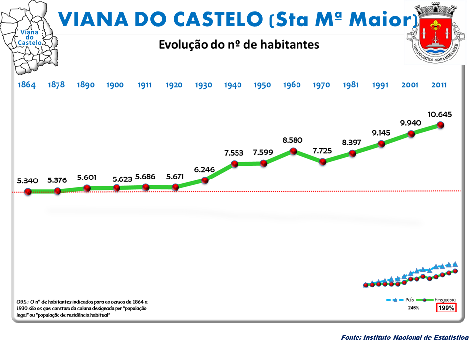 Censos 1864/2011